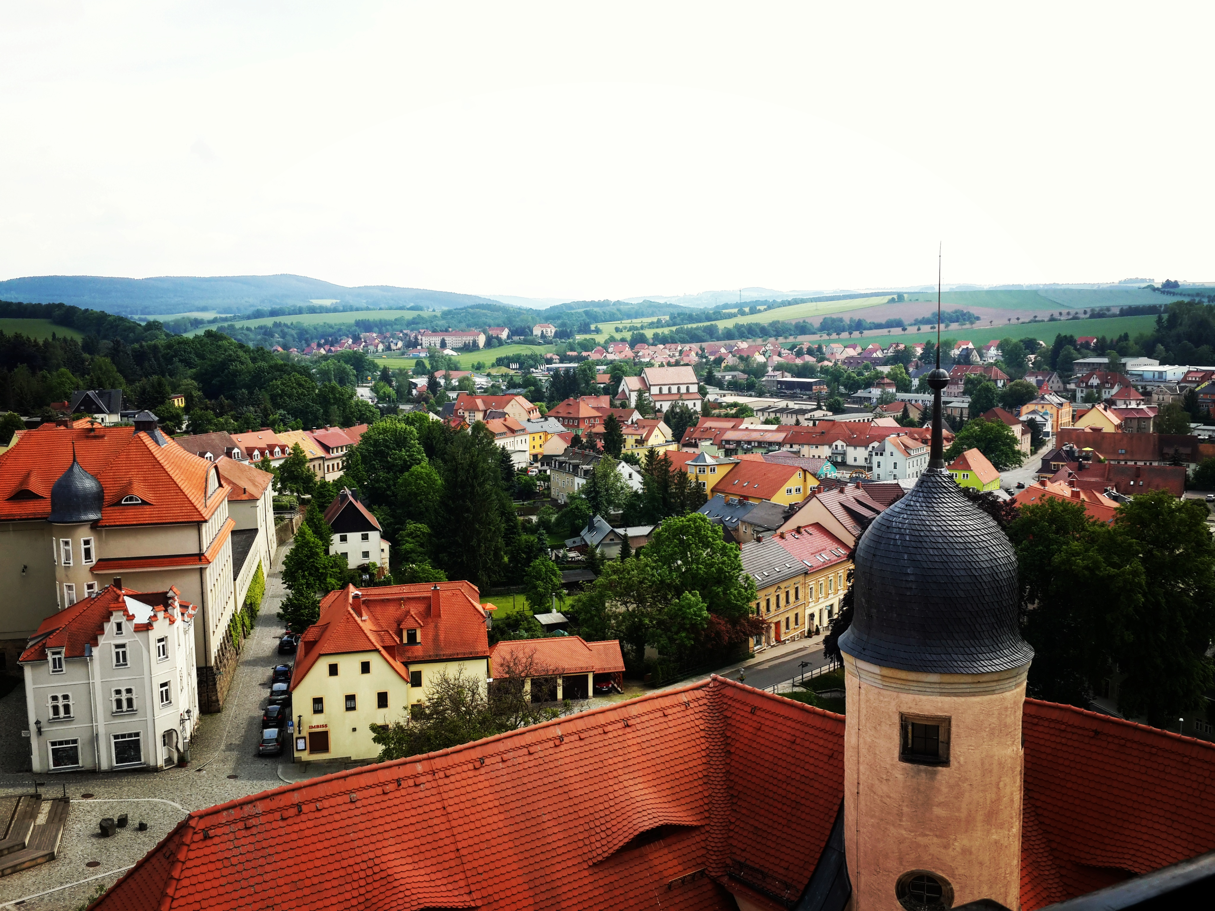 Dippoldiswalde (Ansicht von der Kirche), Sachsen